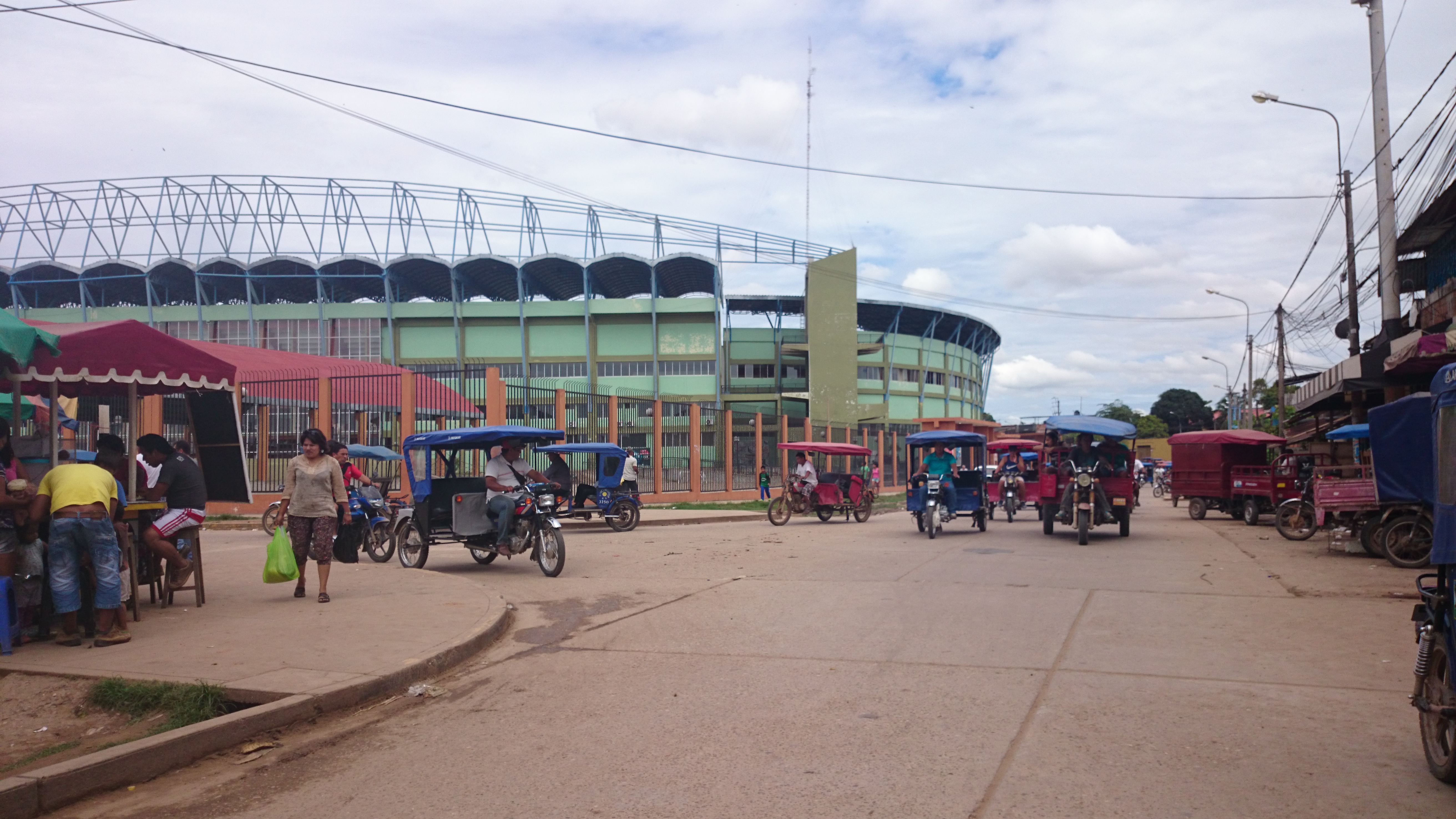 Estadio Aliardo Soria Perez en Pucallpa.